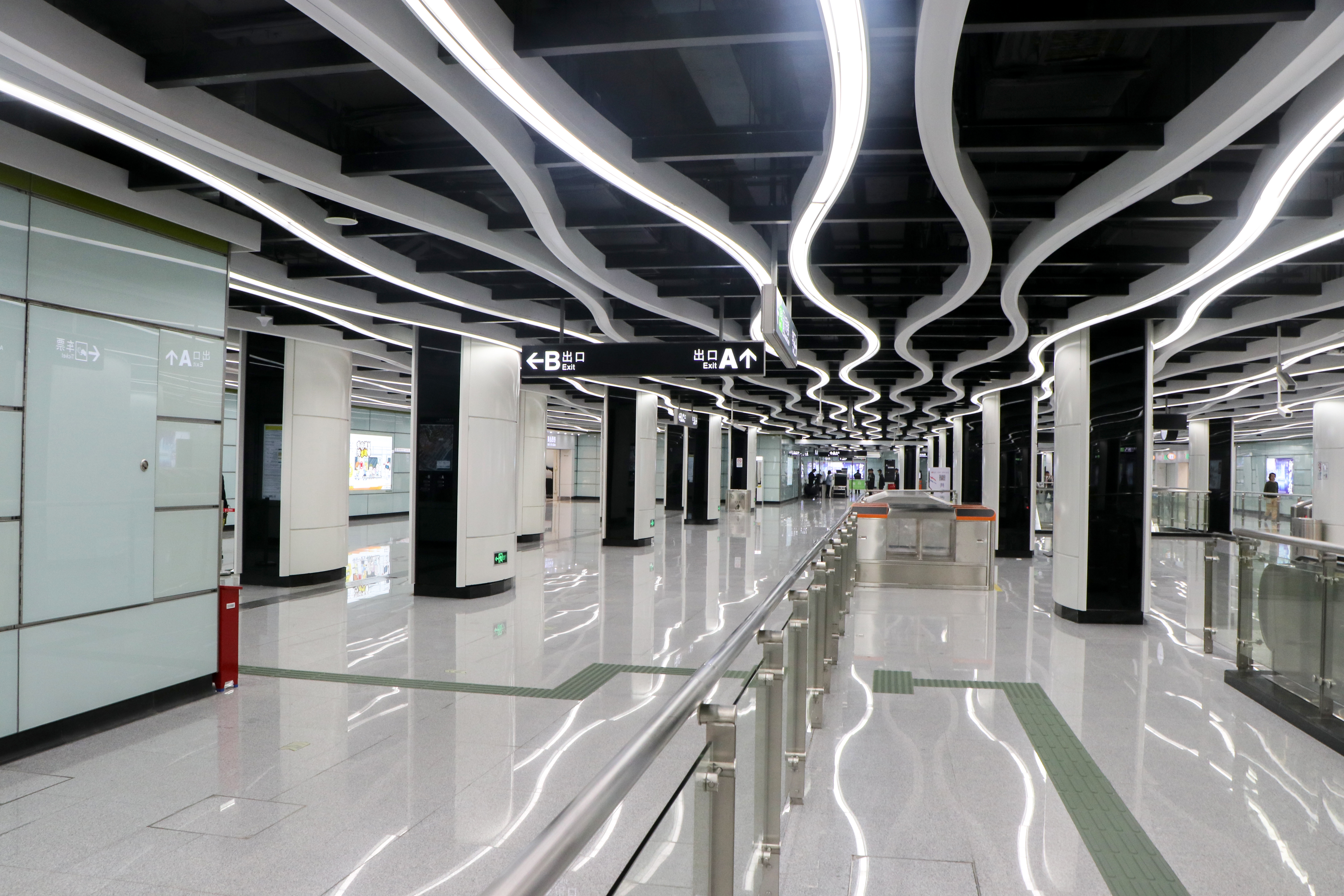 广州地铁裕丰围站